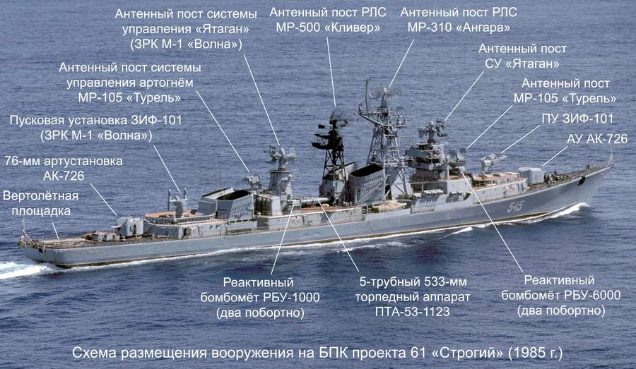 Расположение вооружения на БПК «Строгий» (проект 61, 1985 г.)